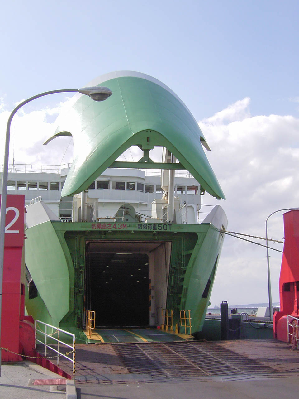 函館港フェリーターミナルに接岸中の道南自動車フェリー「えさん2000」船首、2008年10月11日撮影。